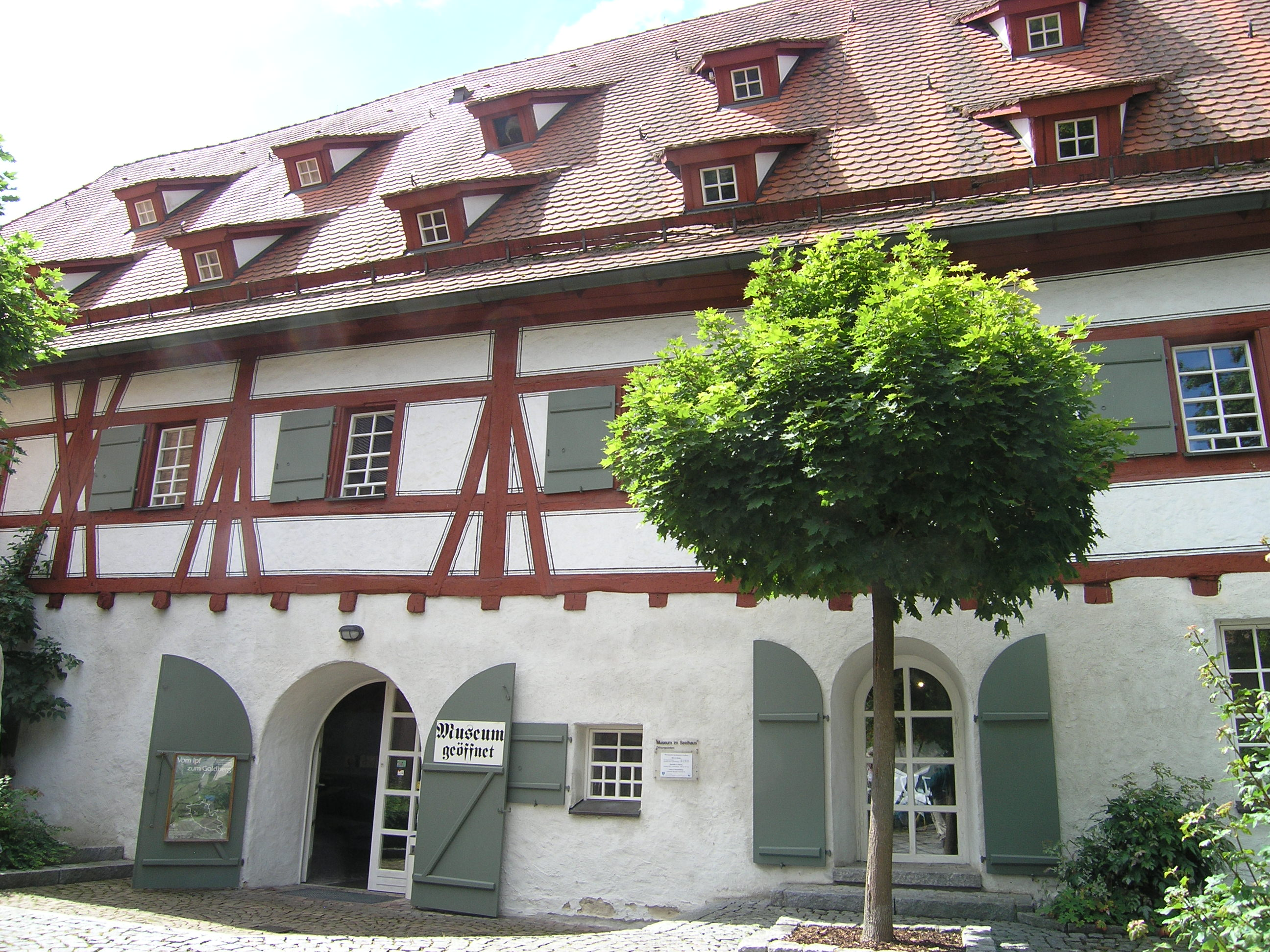 Das Seelhaus in Bopfingen, ein Fachwerkbau von 1505, beherbergt seit 1987 das städtische Museum.